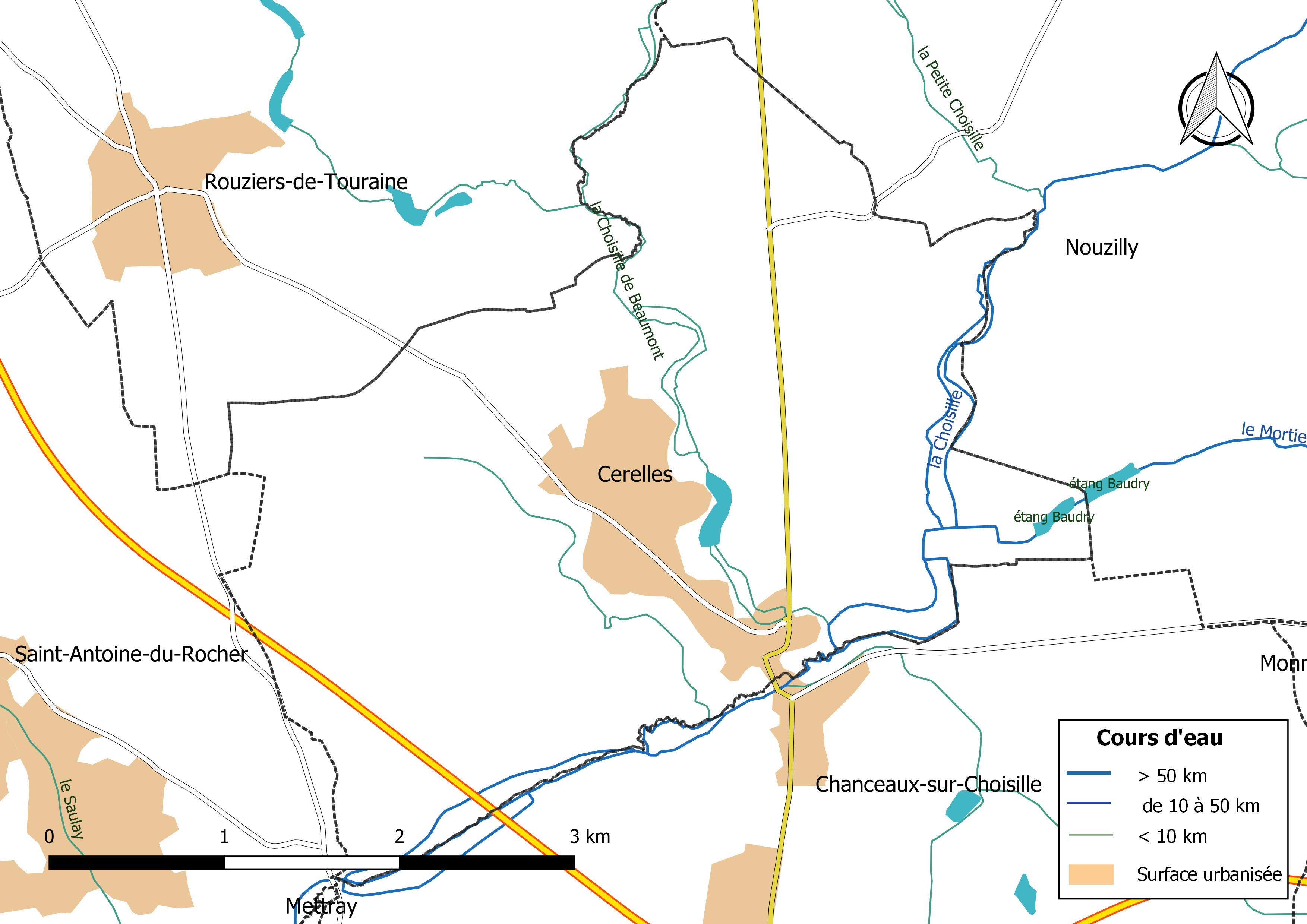 Carte du réseau hydrographique de la commune de Cerelles (France).